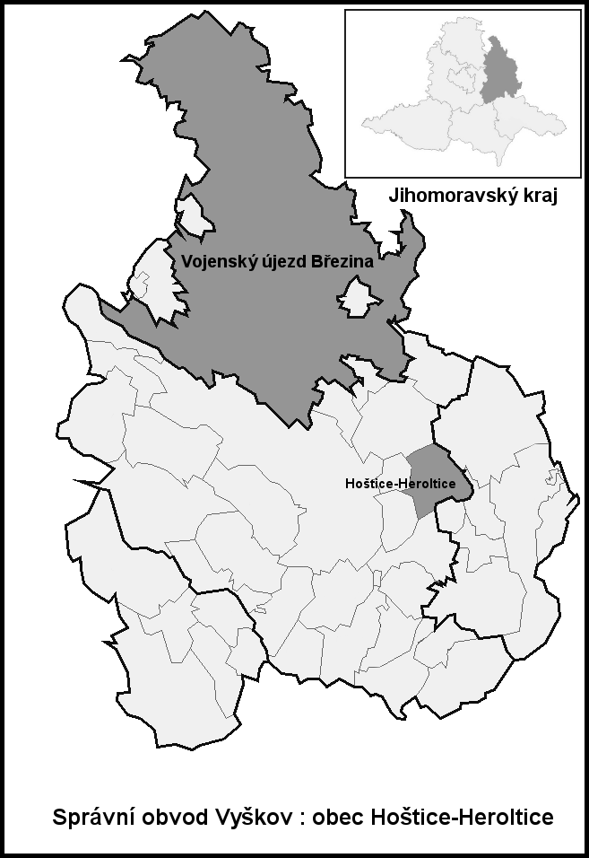 Hranice Hoštice_Heroltice (Vyškov- czech republic)